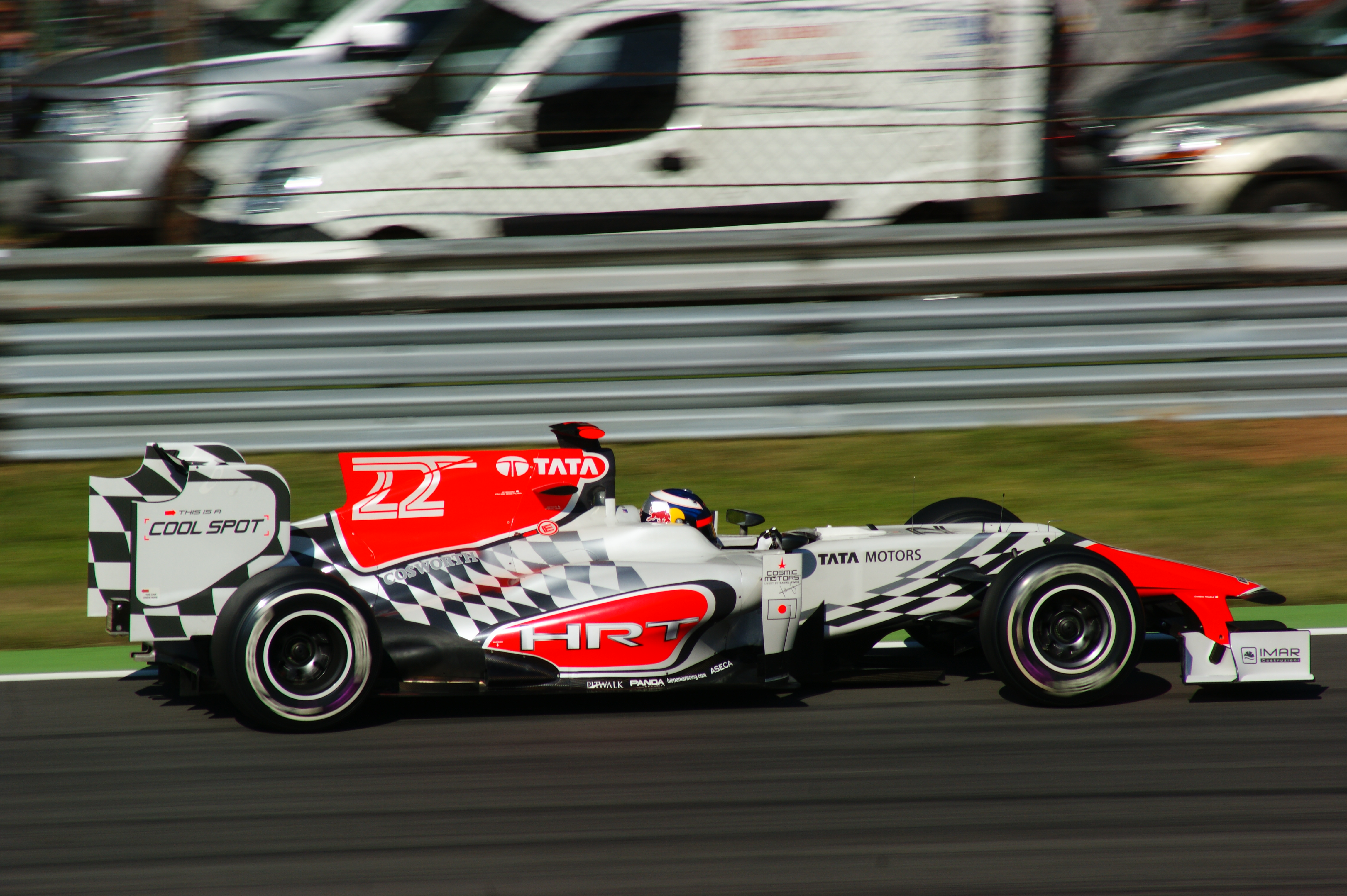 Daniel Ricciardo alla prima variante Monza 2011